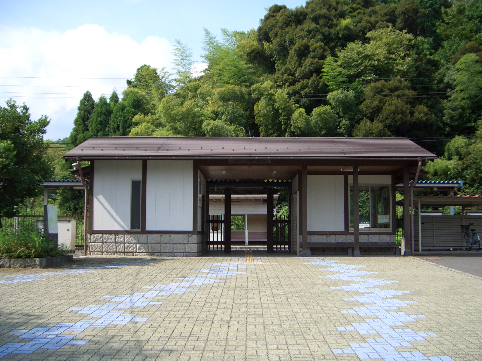 北近畿タンゴ鉄道宮津線四所駅。